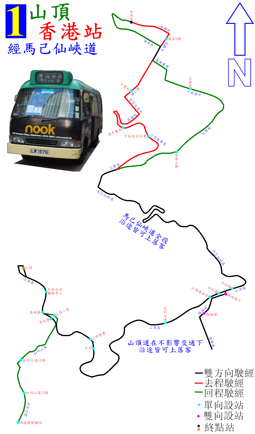 中文（香港）: 港島專線小巴1號線的走線圖